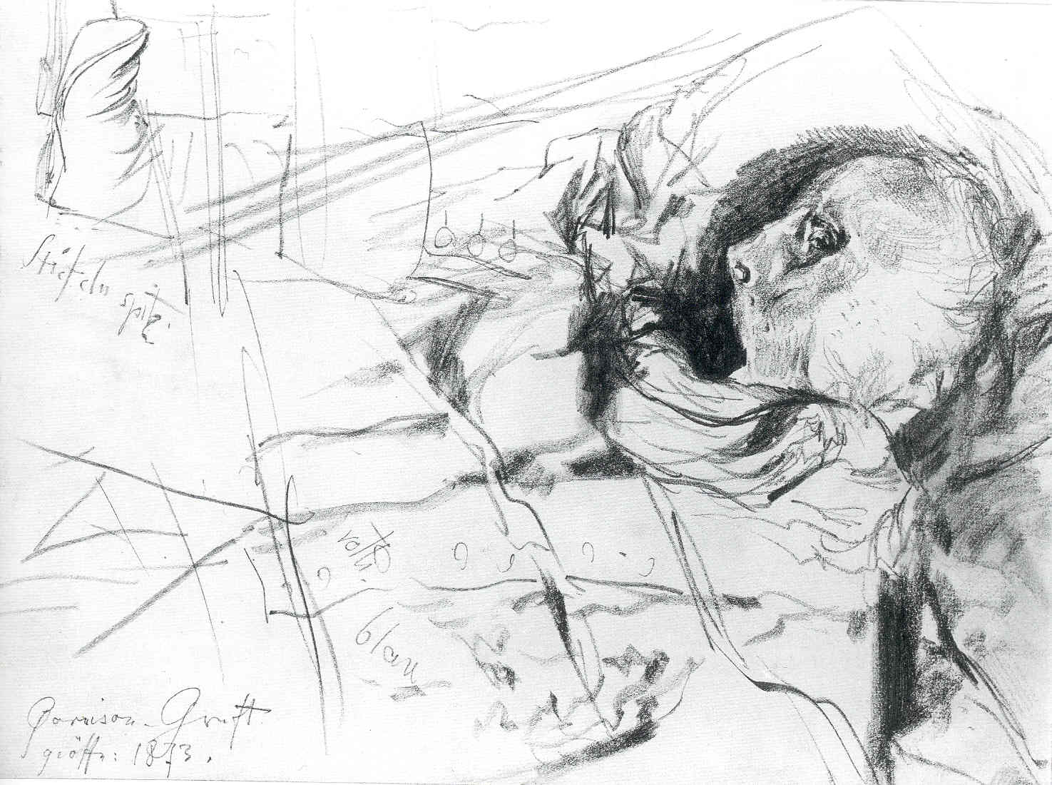 Totenschädel und Stiefel. Bleistift, 23,8×33,2 cm. Berlin, Kupferstichkabinett (SZ Menzel N 251)